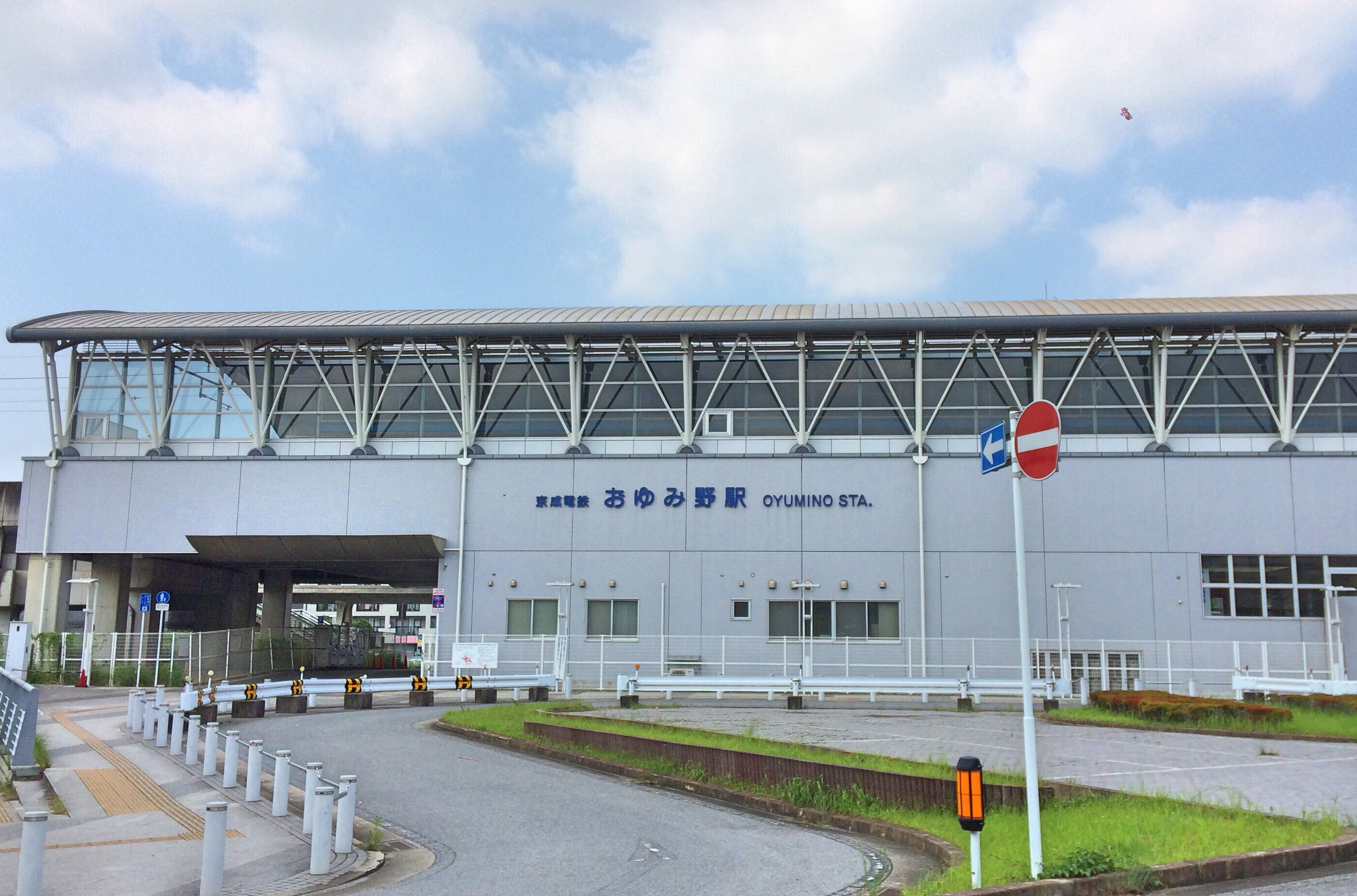 おゆみ野駅裏口